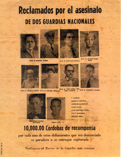 Papeletas lanzadas desde los aviones de la Fuerza Aerea Nacional, pidiendo las cabezas de cada uno de los complotistas que intentaron derrocar al régimen somocista aquel abril de 1954. La recompensa era de 10,000.00 Córdobas.